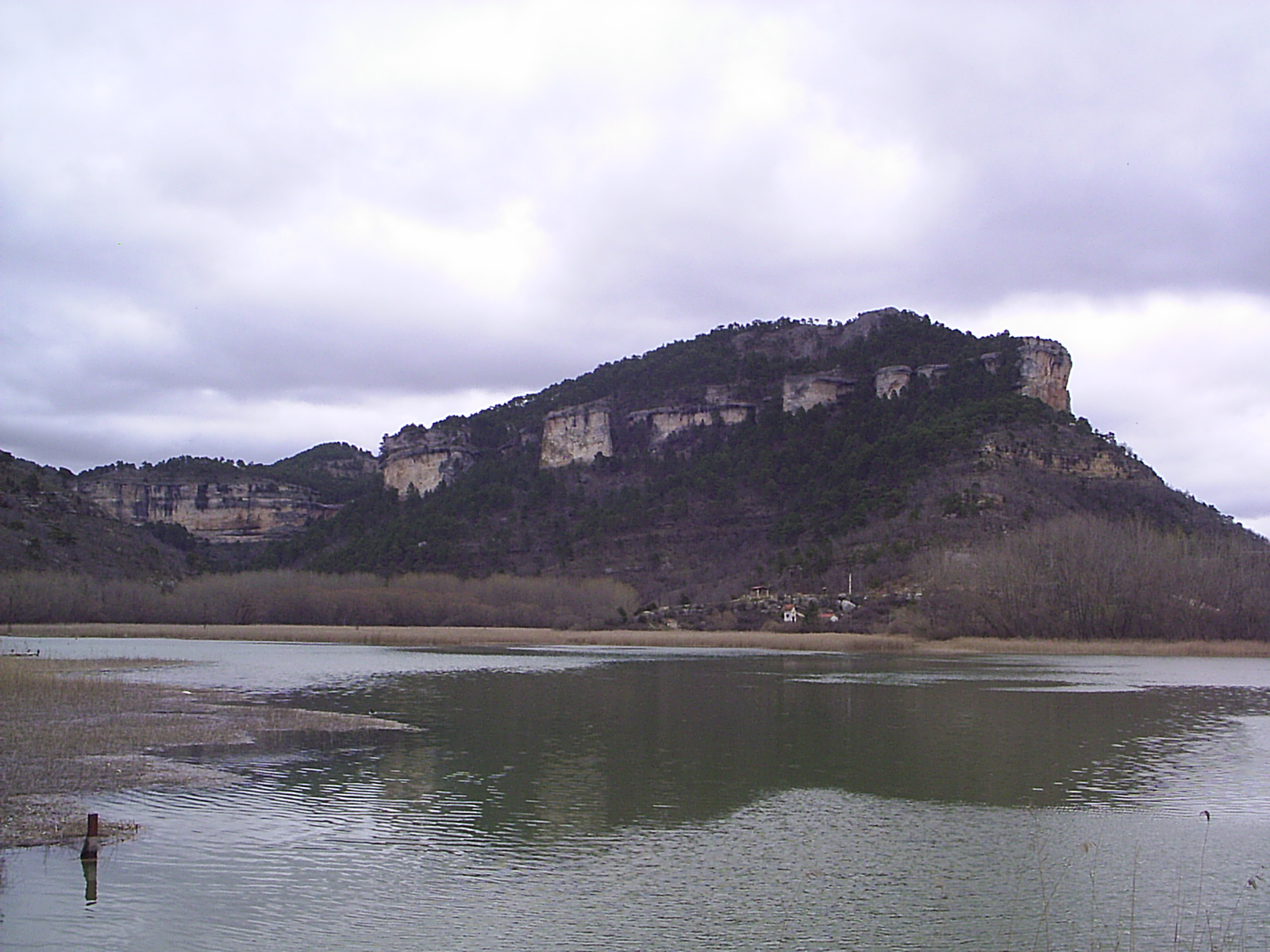 La Laguna de Uña vista desde la presa